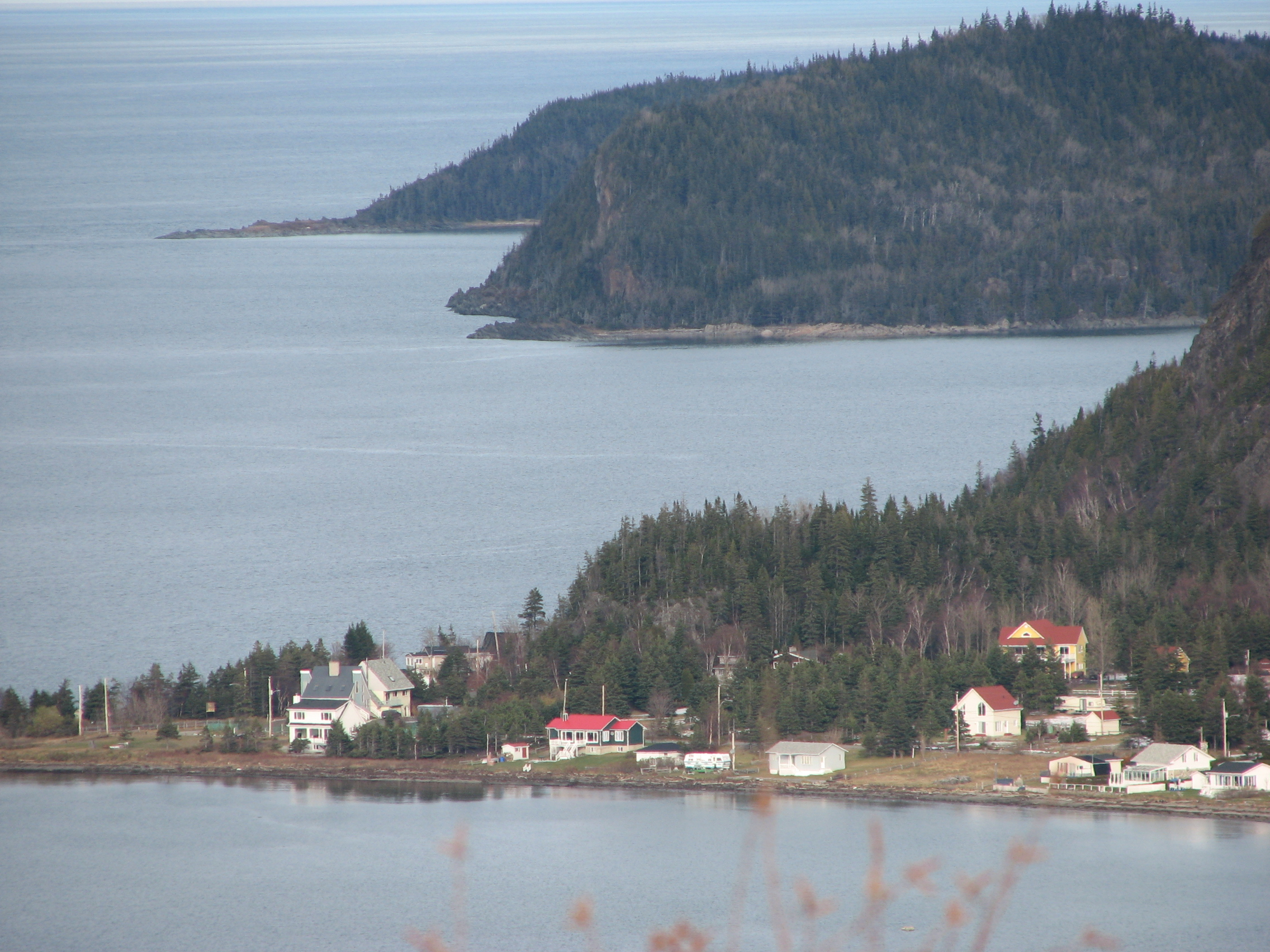 St-Fabien sur Mer